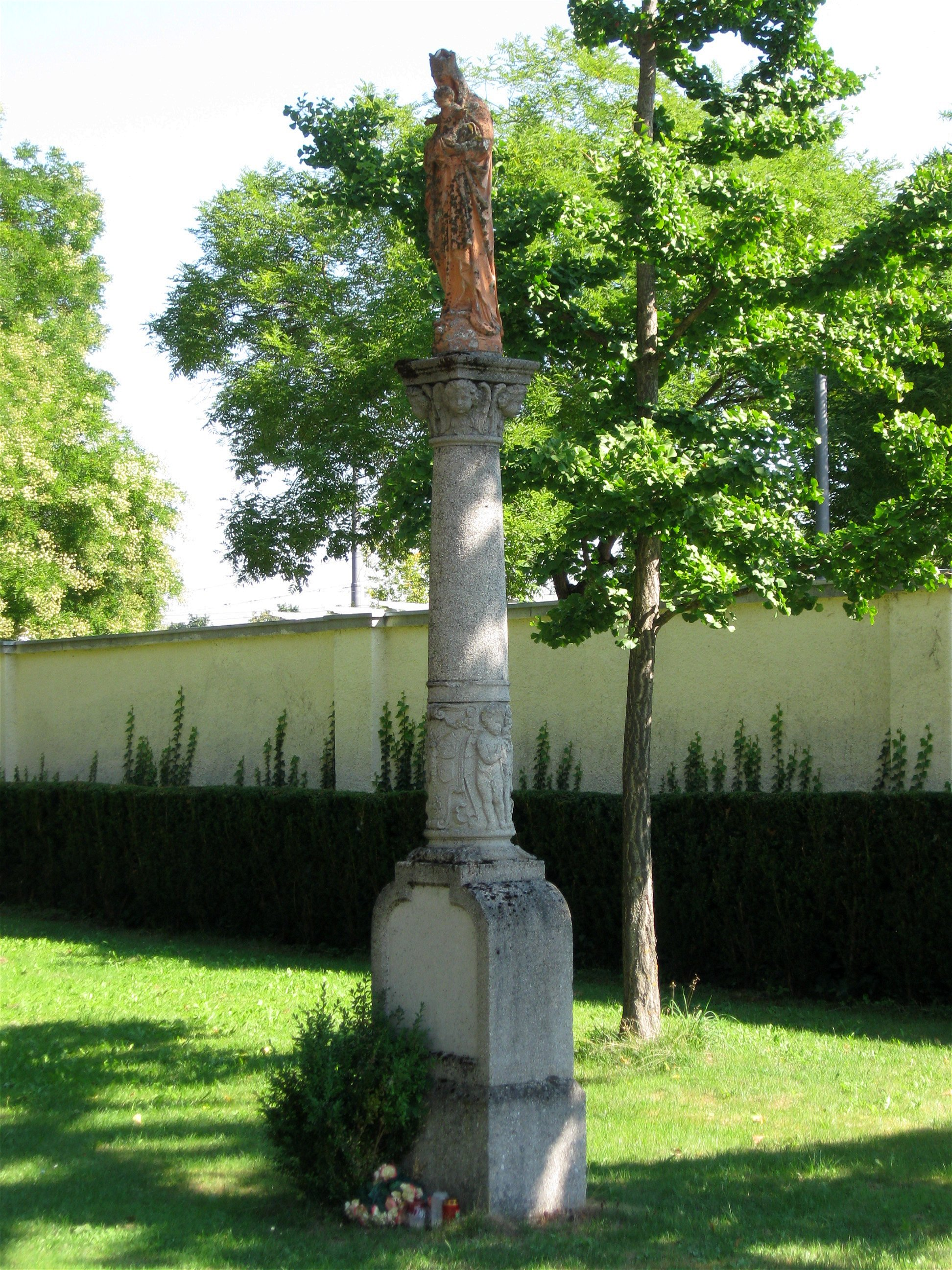 Baldurstraße 28; Westfriedhof, angelegt von Hans Grässel 1897 ff., mehrfach erweitert. Friedhofsgebäude im frühchristlichen Stil, 1897–1902 von Grässel: östlich Verwaltungsgebäude, in der Mitte Versammlungshalle (Kuppelbau mit wohlerhaltener Innenraumgestaltung), westlich Leichenhaus in Form einer Basilika mit Turm und Annexen; die drei Teile durch Arkadengänge verbunden. Nördlich Terrasse, mit steinerner Ölberggruppe unter Baldachin; am Abgang zum zentralen, von Vasenpfeilern umgebenen Gartenparterre östlich hoher Pfeiler mit Feuerschale; im Parterrezentrum steinerne Kreuzgruppe. Westlich an der großen Ostwestallee großer Brunnen, bez. 1911; unweit westlich Platz mit zwei gleichartigen Brunnen von 1901 bzw. 1911. Am Ostende von Gräberfeld 101 Gehäuse mit großer geschnitzter Kreuzgruppe. Gartenkünstlerisch bedeutende Anlage mit zahlreichen Grabdenkmälern seit der Jahrhundertwende. Mariensäule mit Madonna; Künstlerin Hermine Goossens